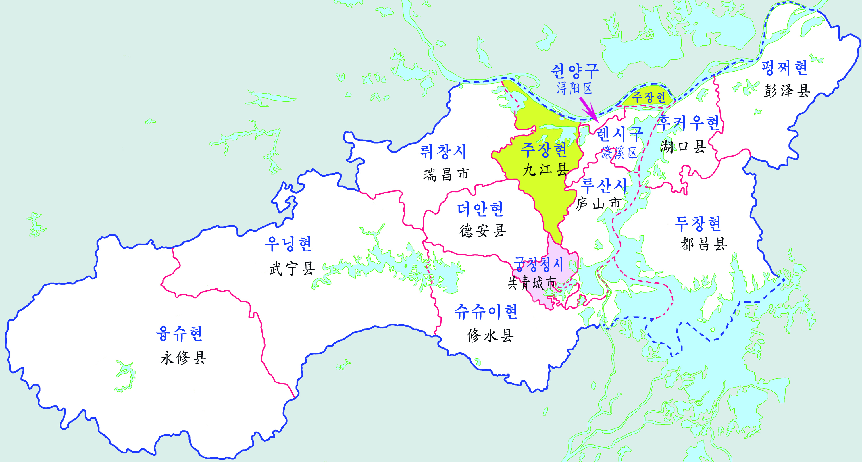 주장시 현급행정구역